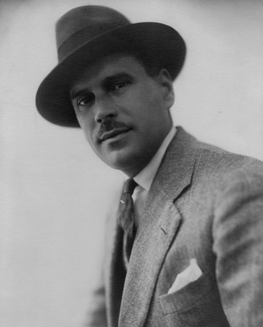 Depicted person: Sirio Tofanari – scultore italiano